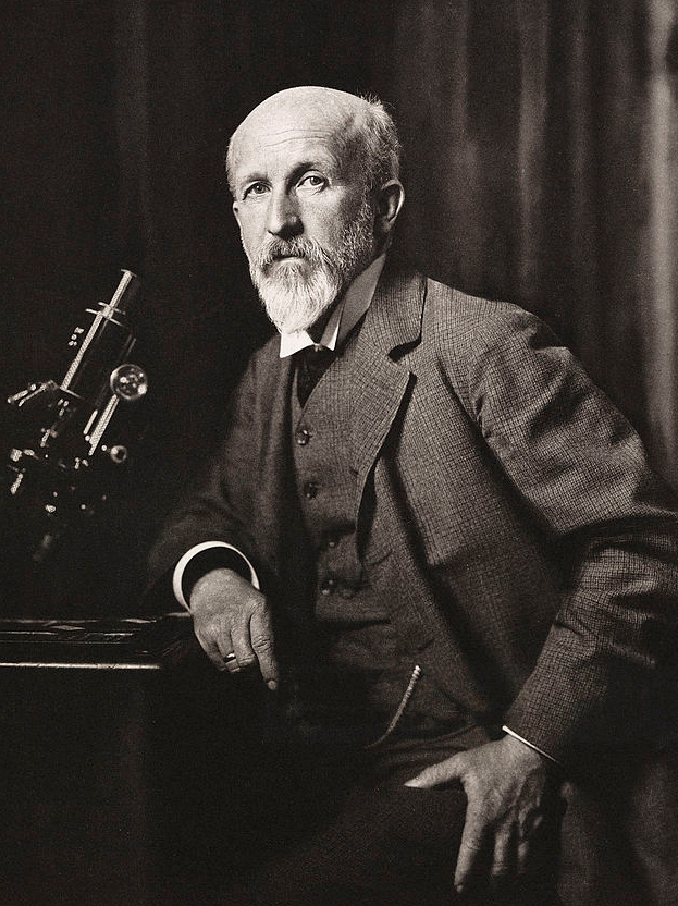 Porträt von Oskar Hertwig, am Mikroskop sitzend. Aufgenommen von Nicola Perscheid, 1906.[1]